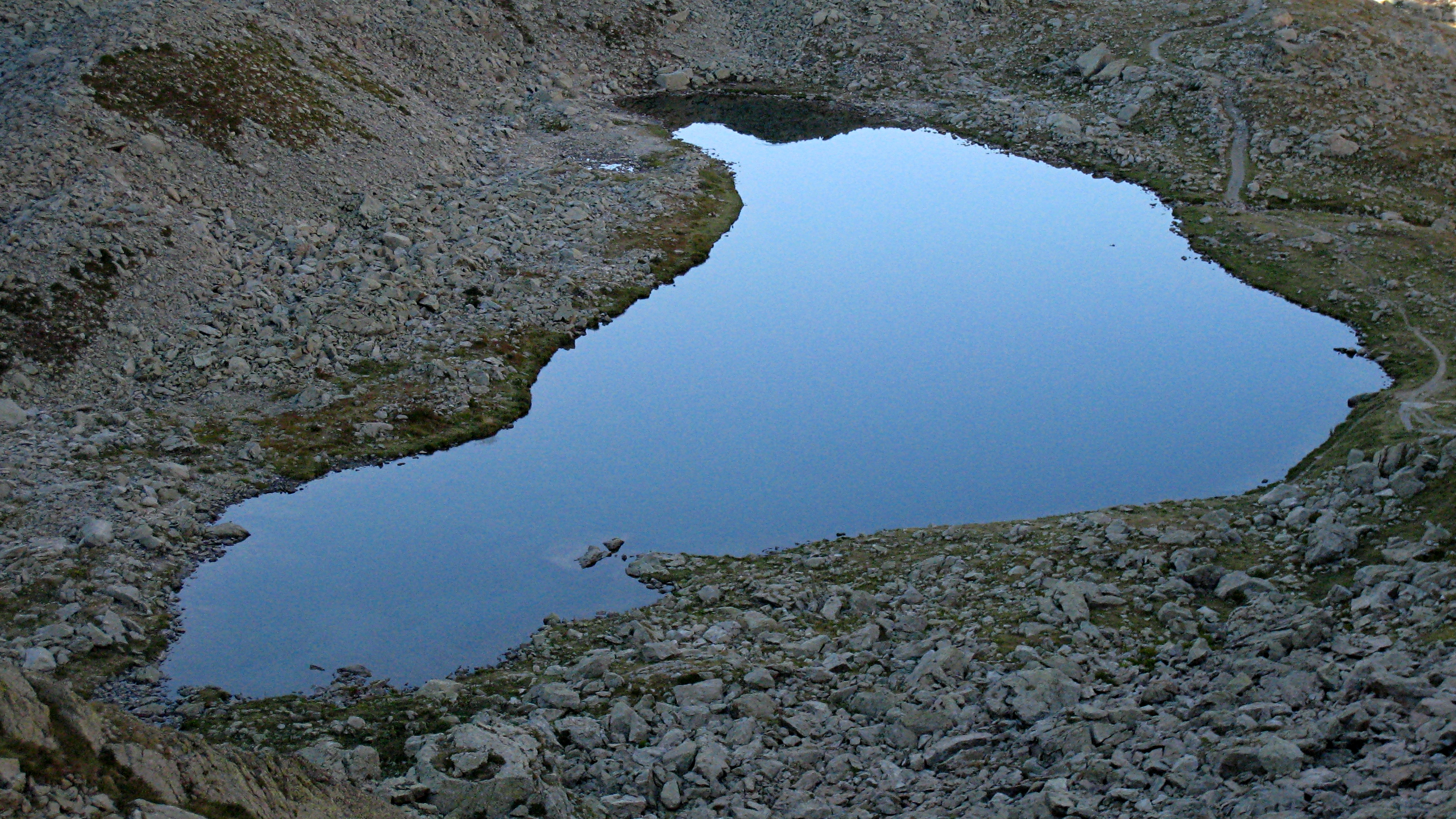 lac de Fenestre, vallée de la Vésubie, parc du Mercantour